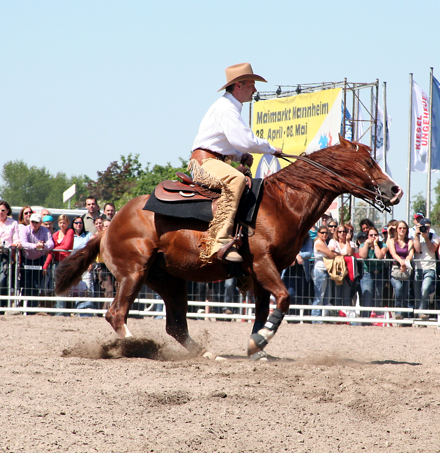 Reining Spin Mannheim Maimarkt 2007